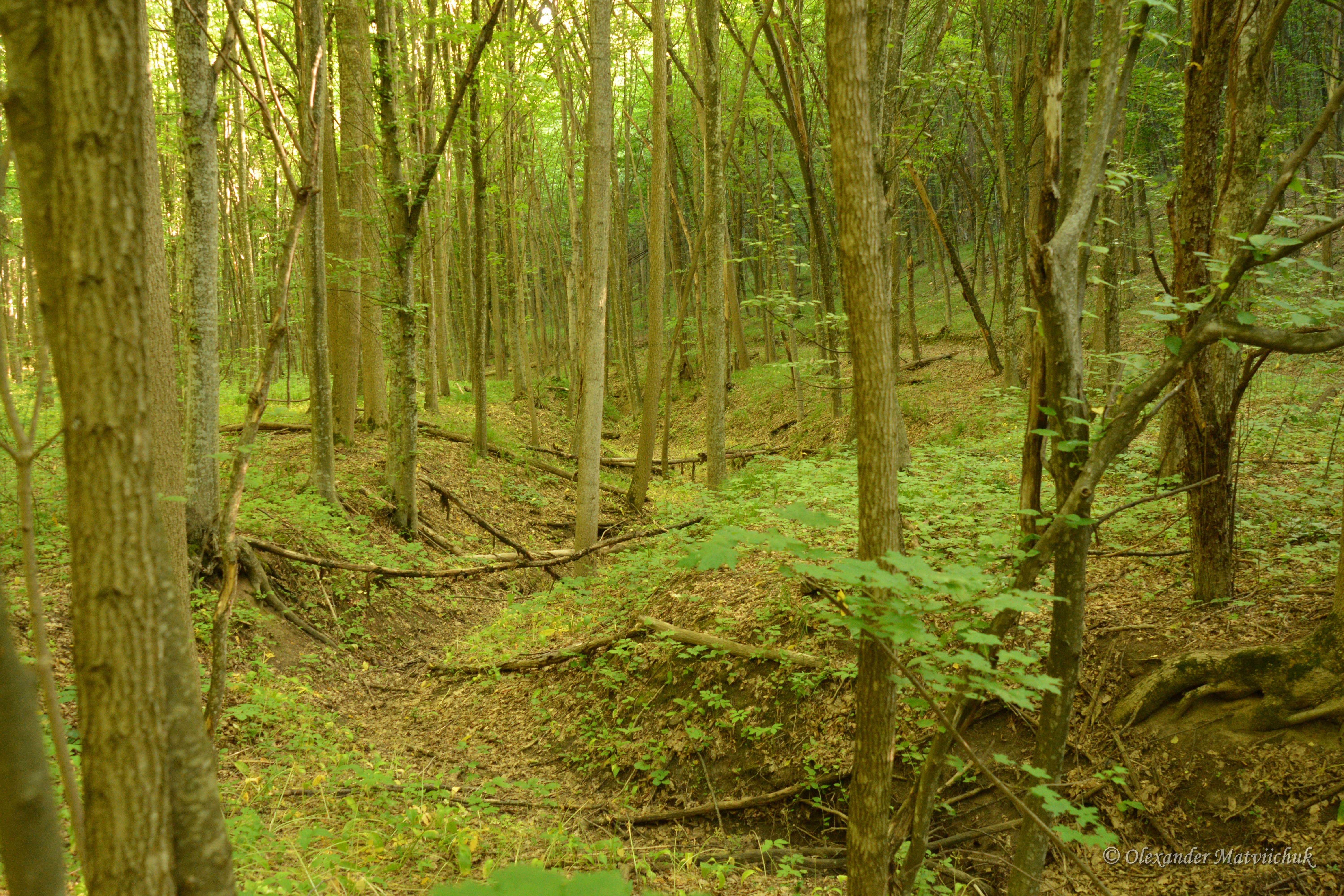 «Кармелюкове Поділля», Чечельницький р-н, Бритавська сільська рада